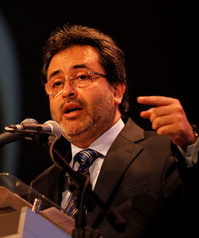 Juan Jiménez Mayor - Presidente del Consejo de Ministros del Perú (2012-1013)